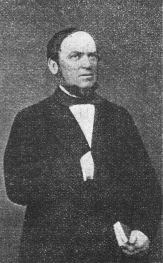 Wilhelm Schwartz als Direktor des Ruppiner Gymnasiums